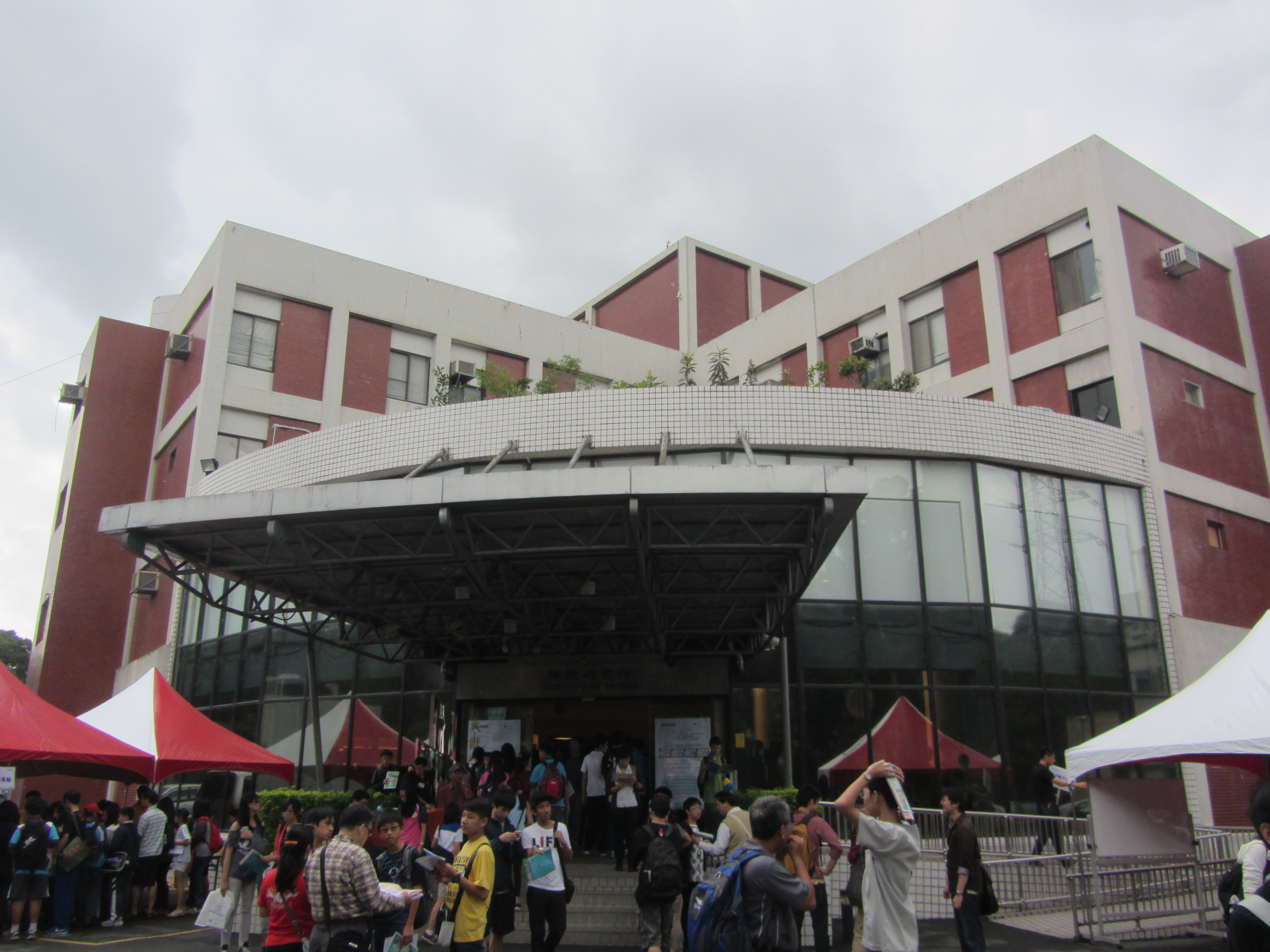 中央研究院物理研究所。